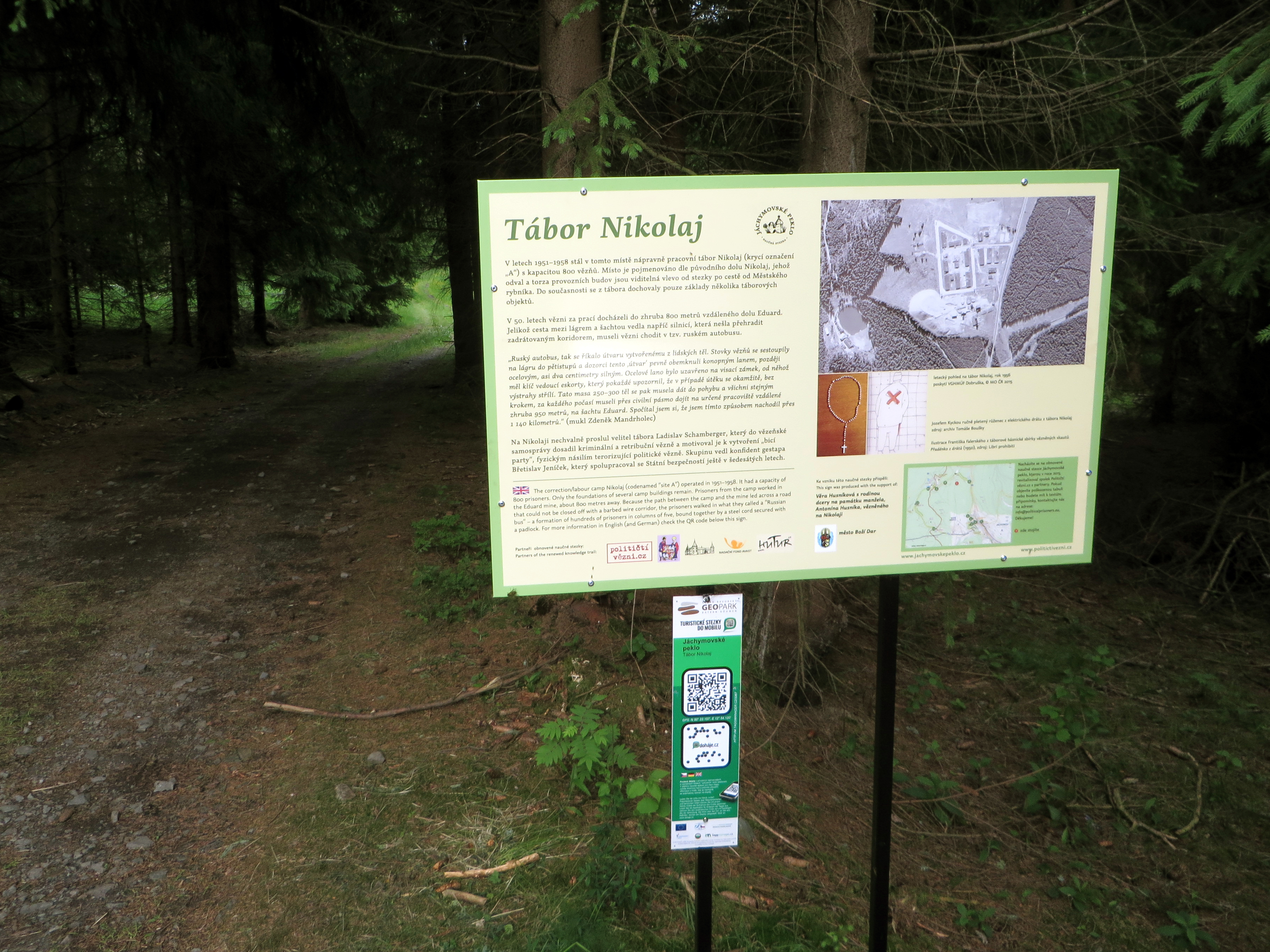 Panel šesté zastávky obnovené Naučné stezky Jáchymovské peklo u bývalého pracovního tábora Nikolaj. Stav v den zahájení provozu v červnu 2015.